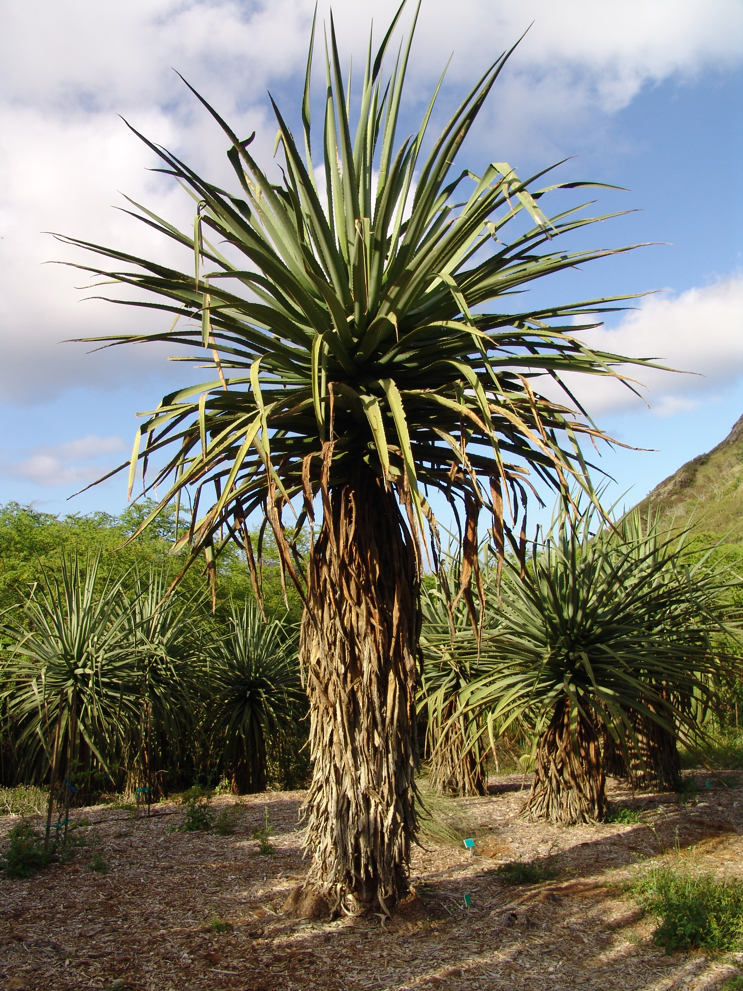 Koko Crater Botanical Garden Oahu Hawaii